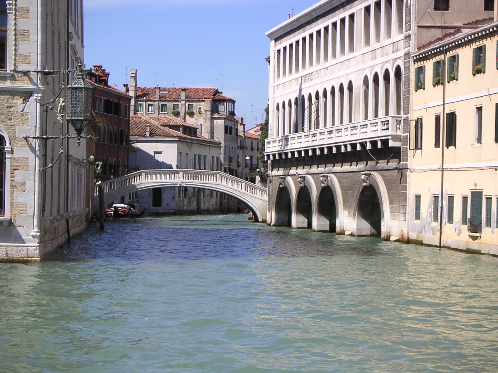 rio de ca foscari depuis le grand canal - venise